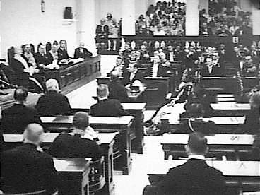 Opening van de Indische Volksraad door de gouverneur-generaal, jhr. mr. A.C.D. de Graeff